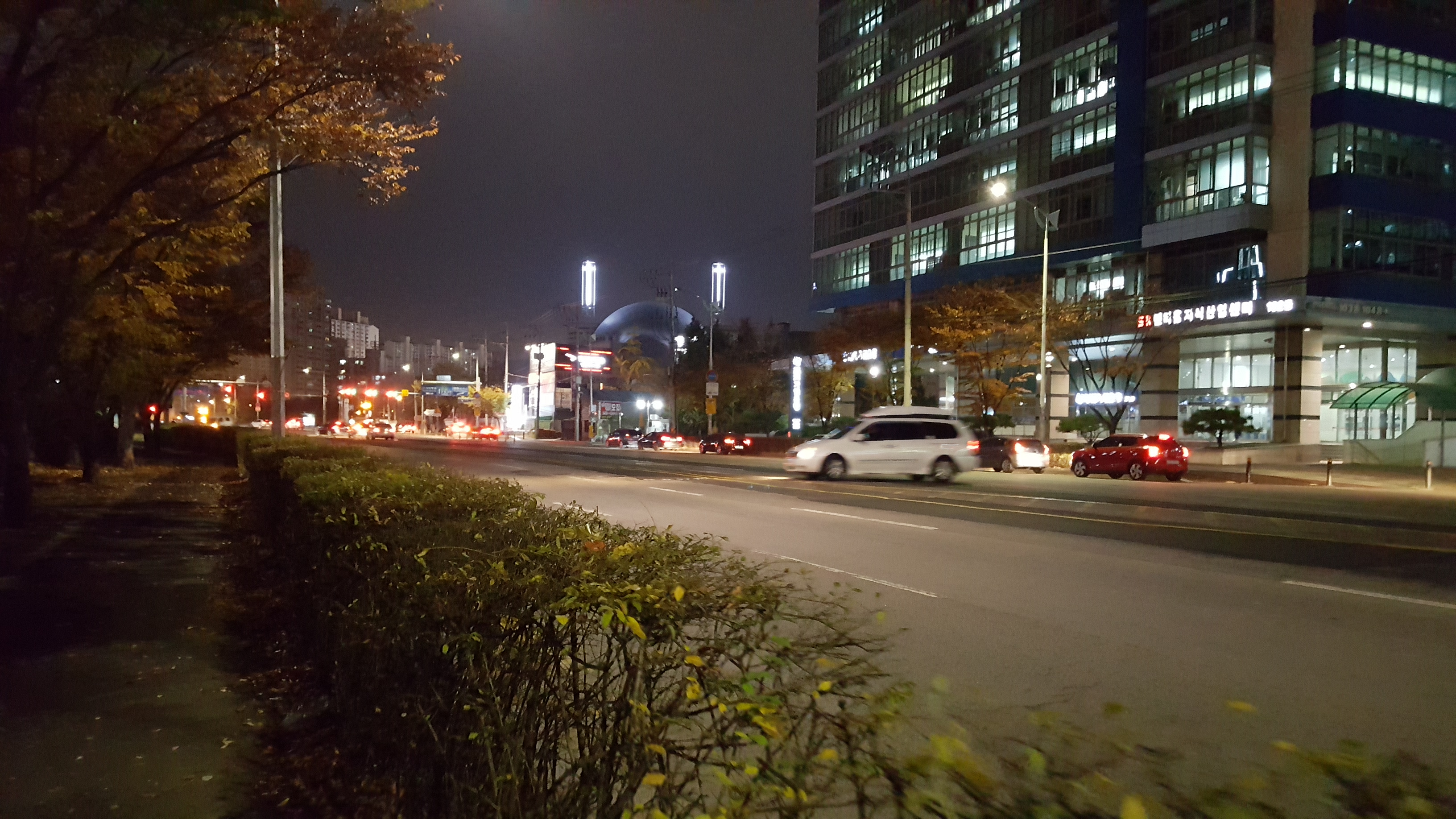 군포시 당정동 고산로의 모습